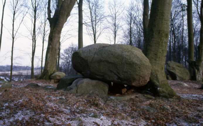 Pipstorn